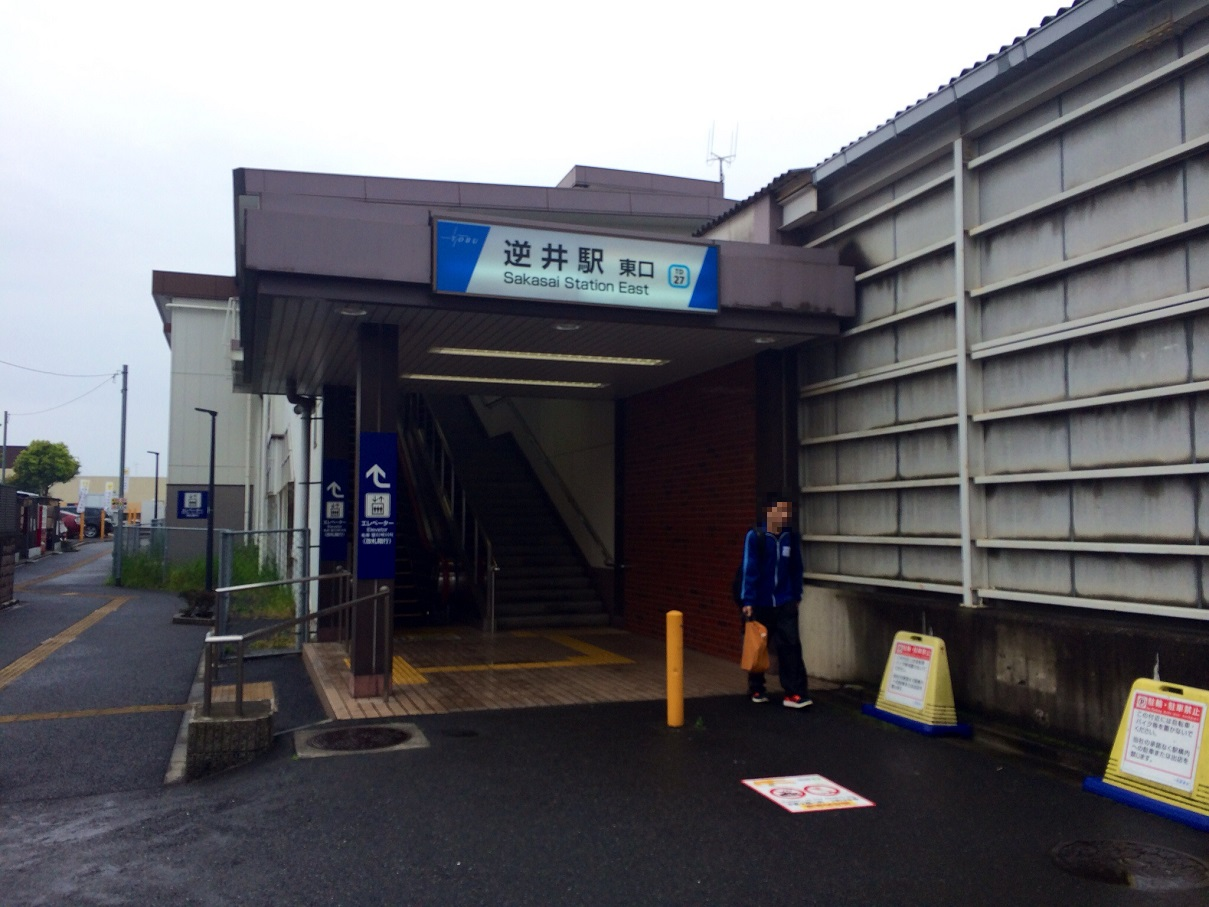 東武野田線(アーバンパークライン)逆井駅